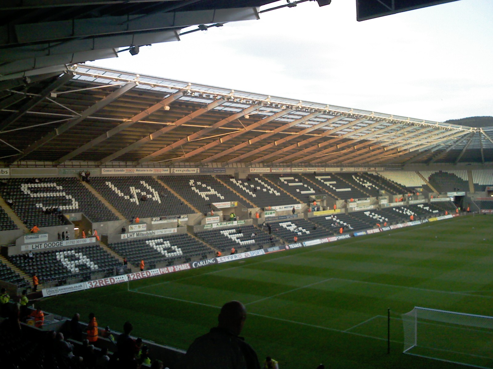 IMAGE_154